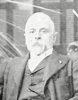 El comerciante Tomás Ambrosetti, de activa participación en las asociaciones de la colectividad italiana.